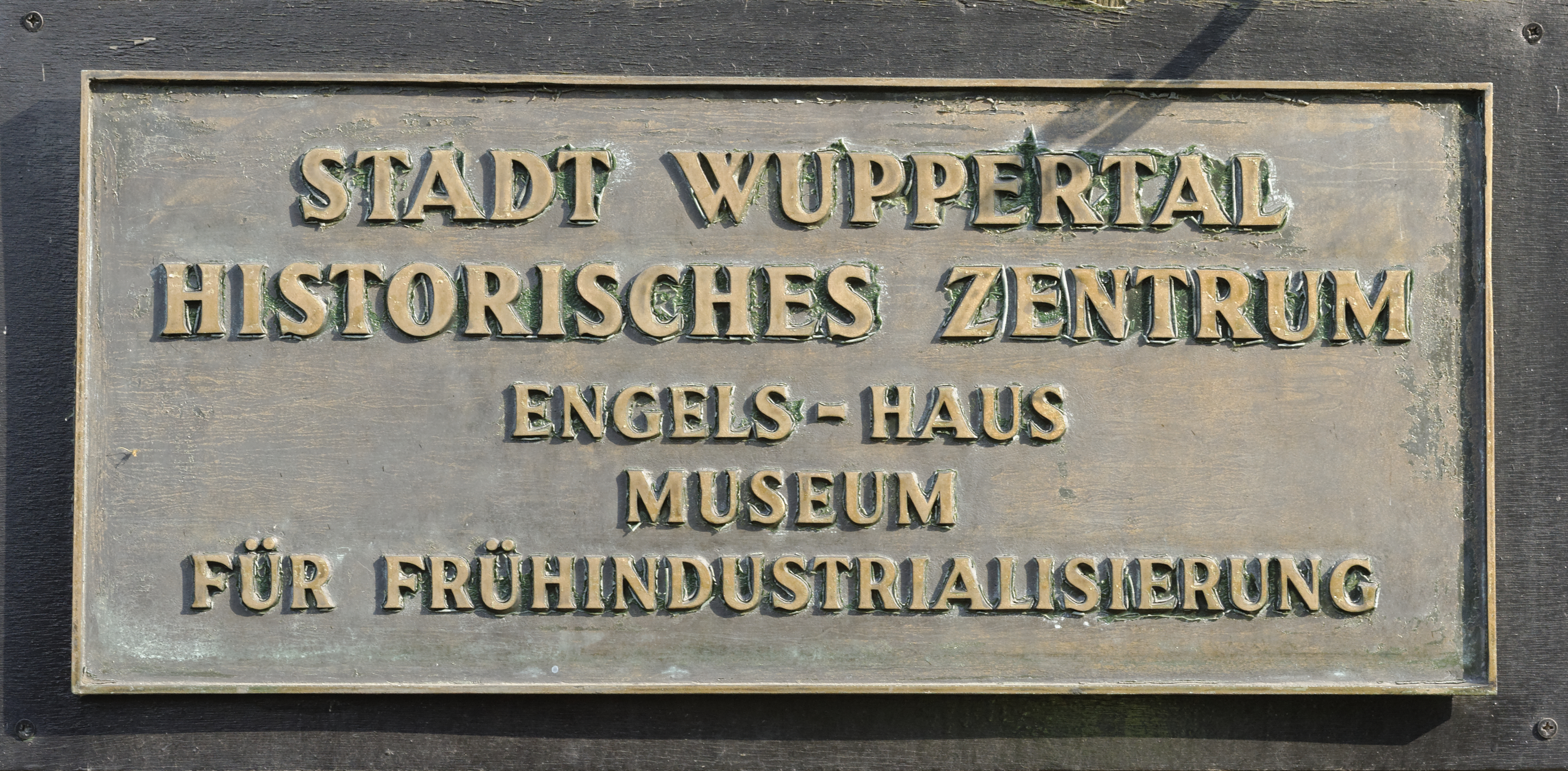 Engelsfest Wuppertal 2013 Engels-Haus